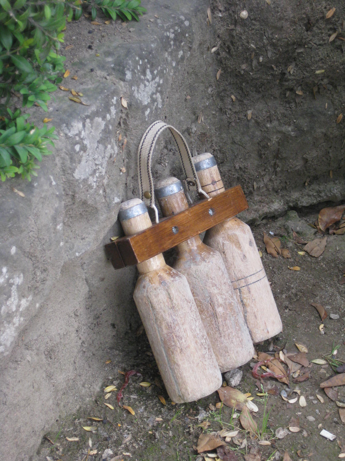 Joc Popular. El Club de Jubilats l'Estel, jugant a bitlles a Solsona.